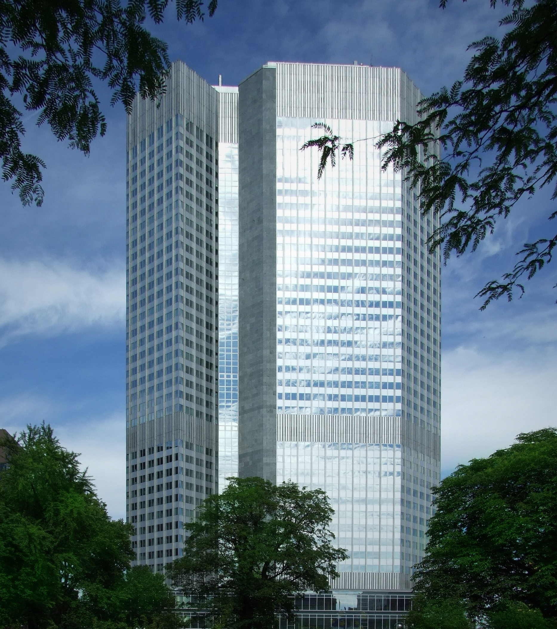 Eurotower, Sitz der Europäischen Zentralbank (Westseite)